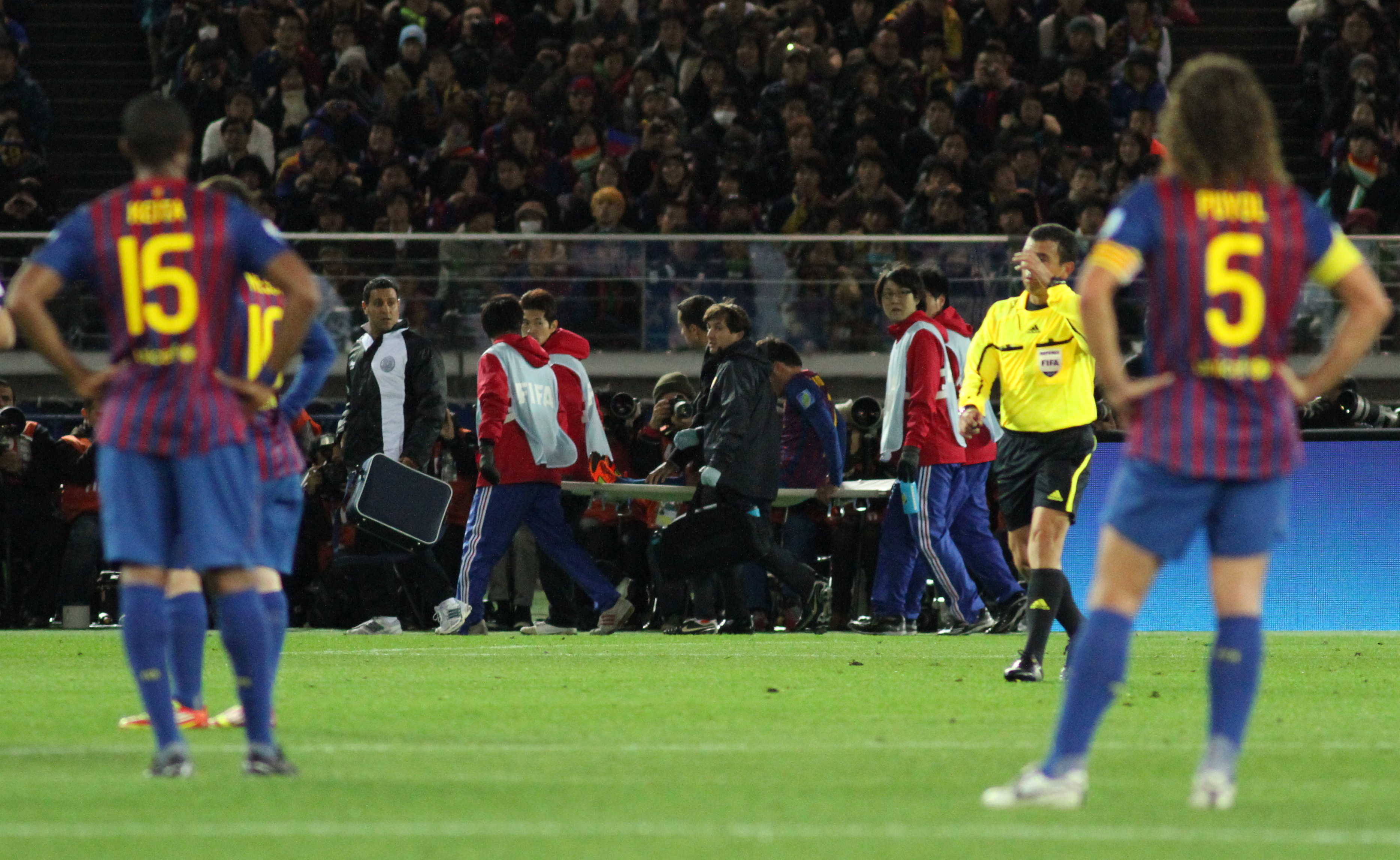 David Villa resultó lesionado de gravedad en la semifinal del Mundial de Clubes, en un partido que enfrentó al FC barcelonal con el Al Saad.